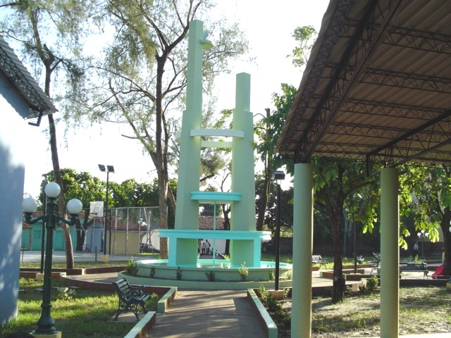 Parque central de Osicala